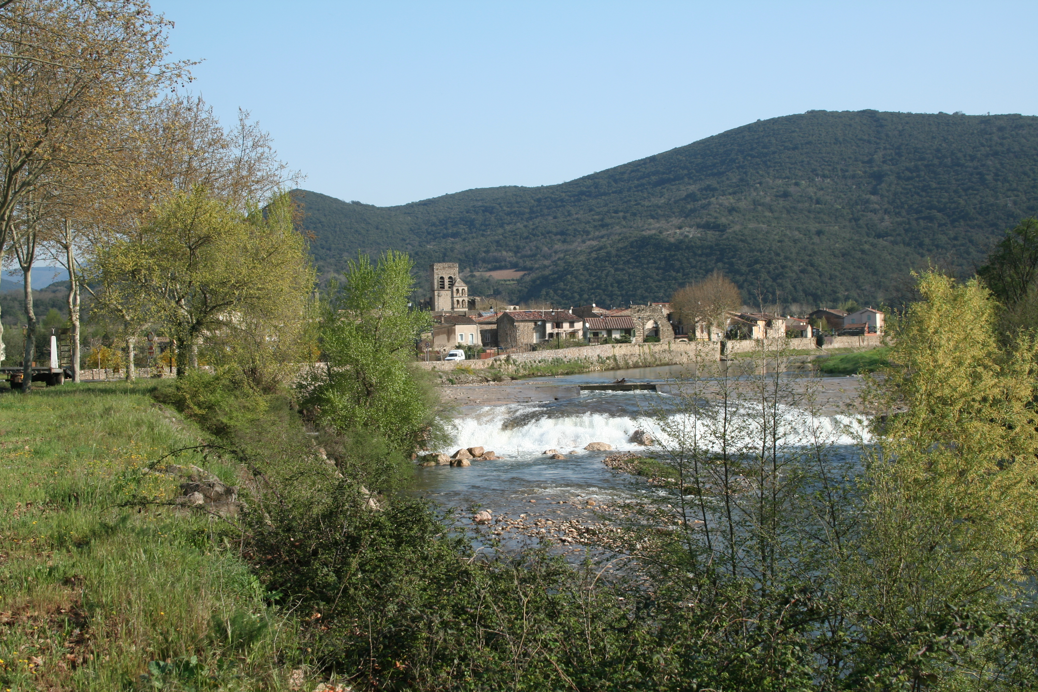 Villemagne-l'Argentière (Hérault) - vue générale sur le village et la rivière La Mare.